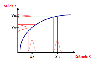 no-linealidad: diseño robusto